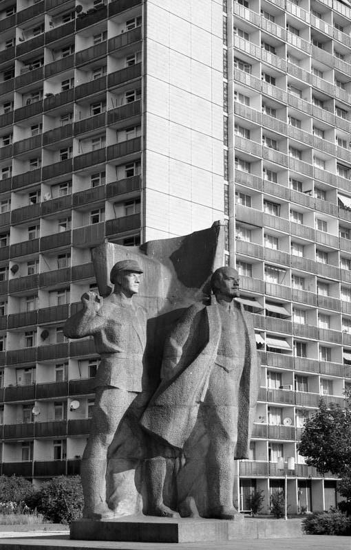 7.7.1991 Stadtansichten Dresden Lenindenkmal Information added by Wikimedia users.